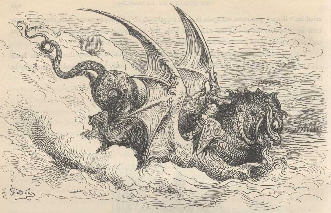 Gustave Doré, ilustração para "Dom Quixote" de Miguel de Cervantes